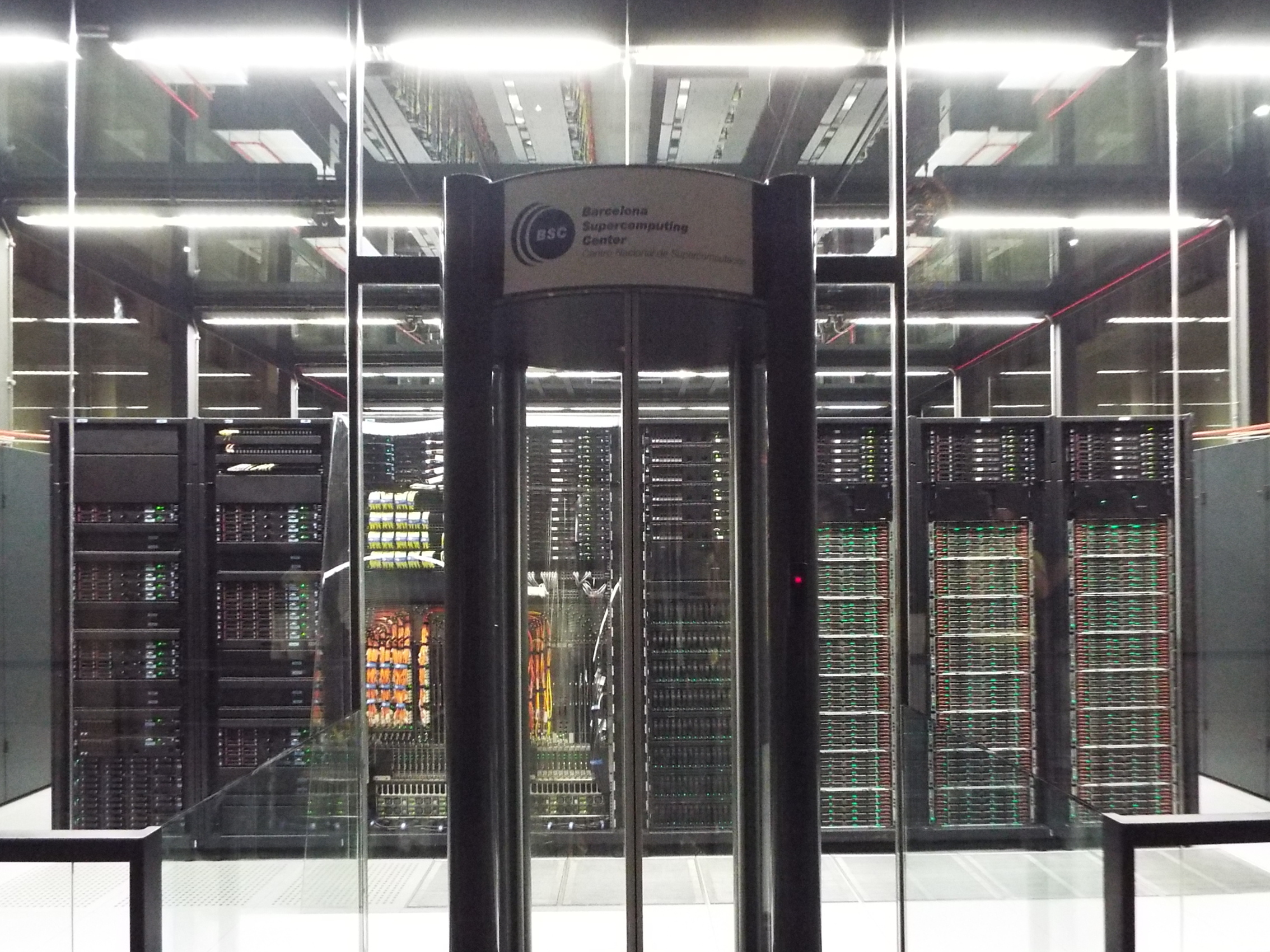 Acceso a la jaula de cristal del supercomputador MareNostrum III, situado en la antigua capilla junto a la Torre Girona, en el Barcelona Supercomputing Center-Centro Nacional de Supercomputación, España.